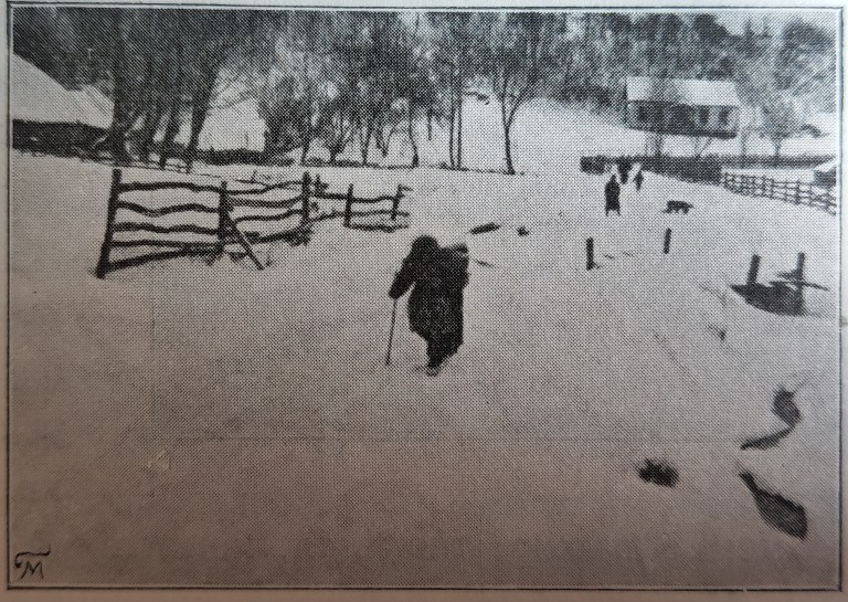 Г. Фехнер. Декілька слів про композицію.